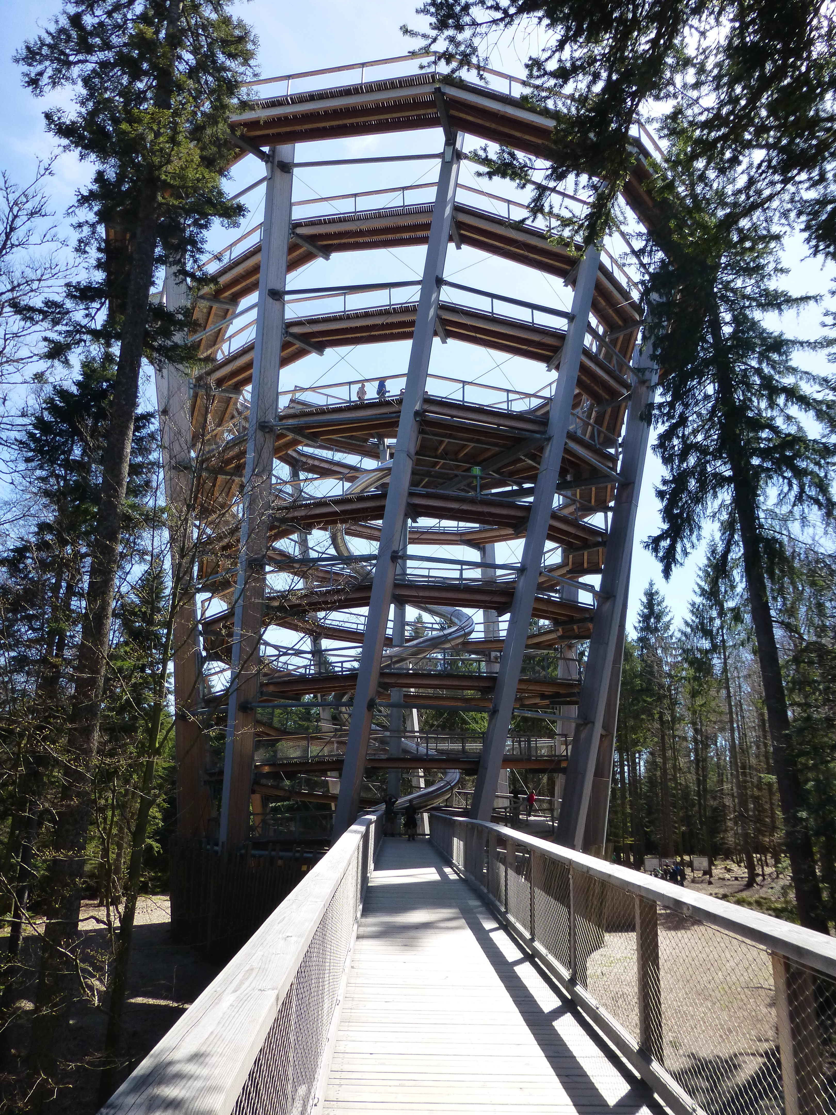 Baumwipfelpfad Schwarzwald; Zugang zum Aussichtsturm